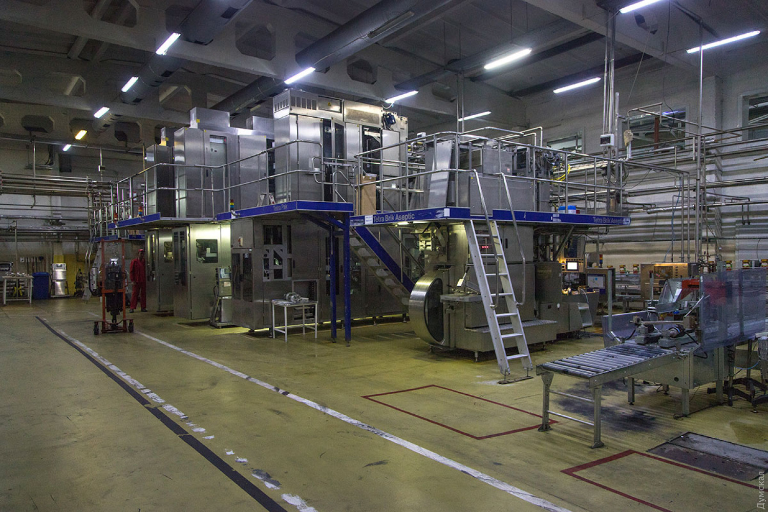 Современный цех подготовки продукции к розливу